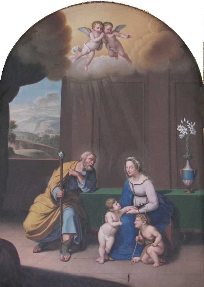 Sacra Famiglia, tela del 1841, Santa Maria di Licodia